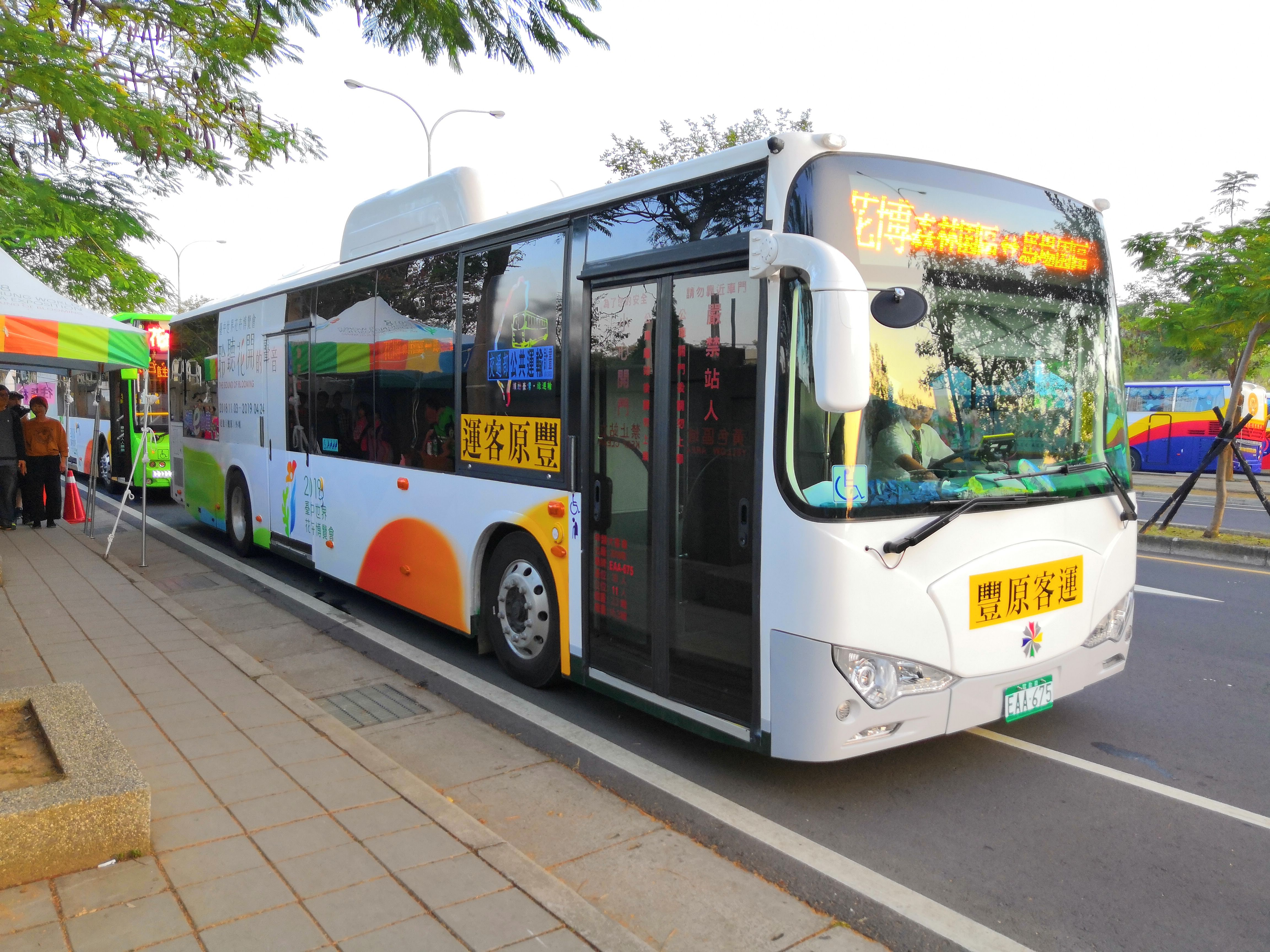 豐原客運花卉博覽會接駁車 比亞迪K9大客車 EAA675